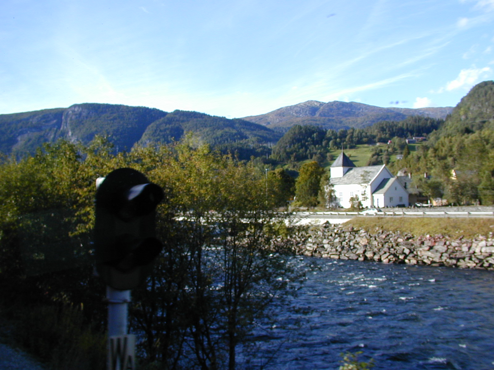 Evanger kyrkje sett frå Bergensbanen. Elva er Vosso, like før ho vert til Evangervatnet, og vegen er Europaveg 16